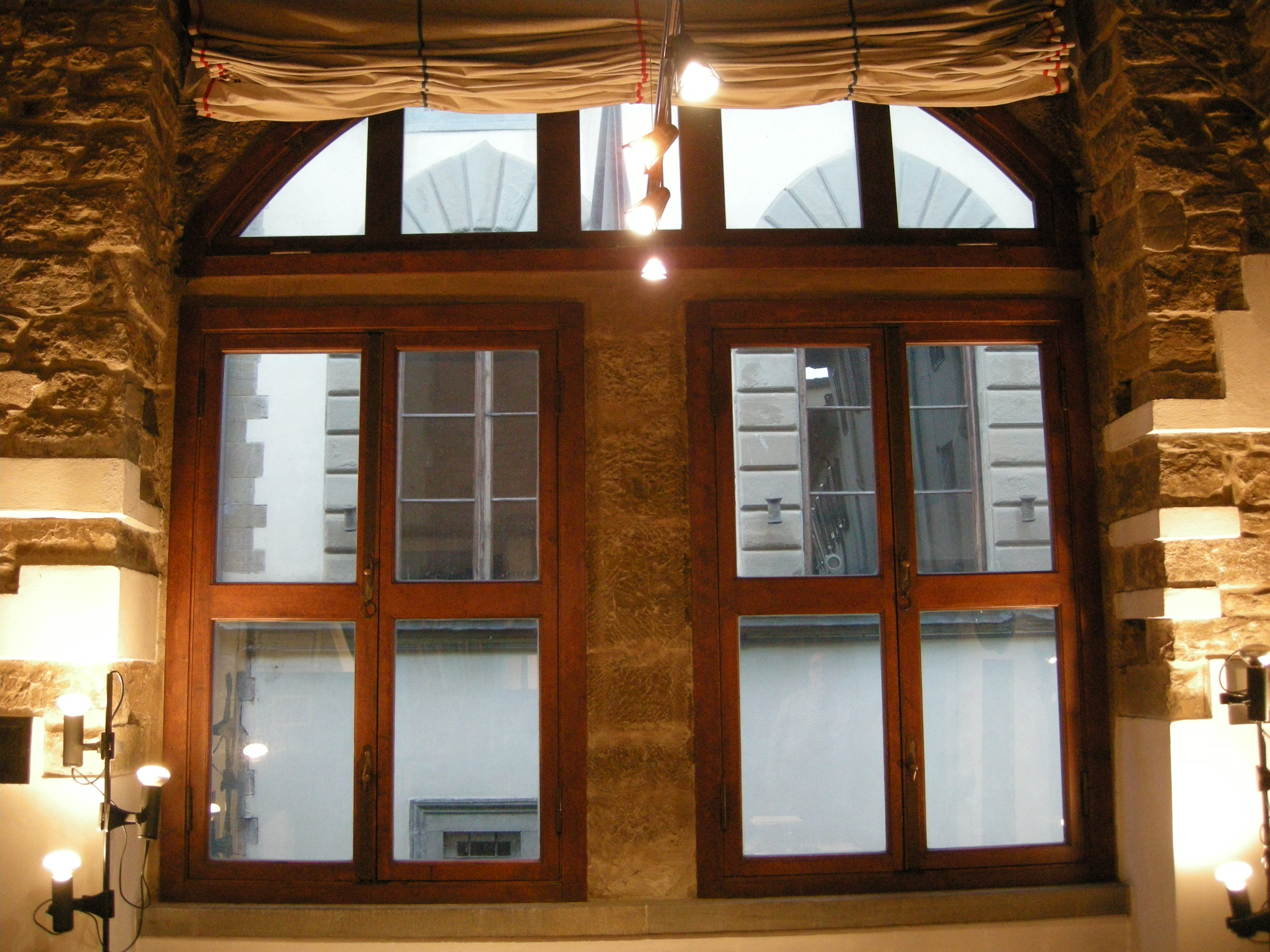 Torre dei lanfredini, interno